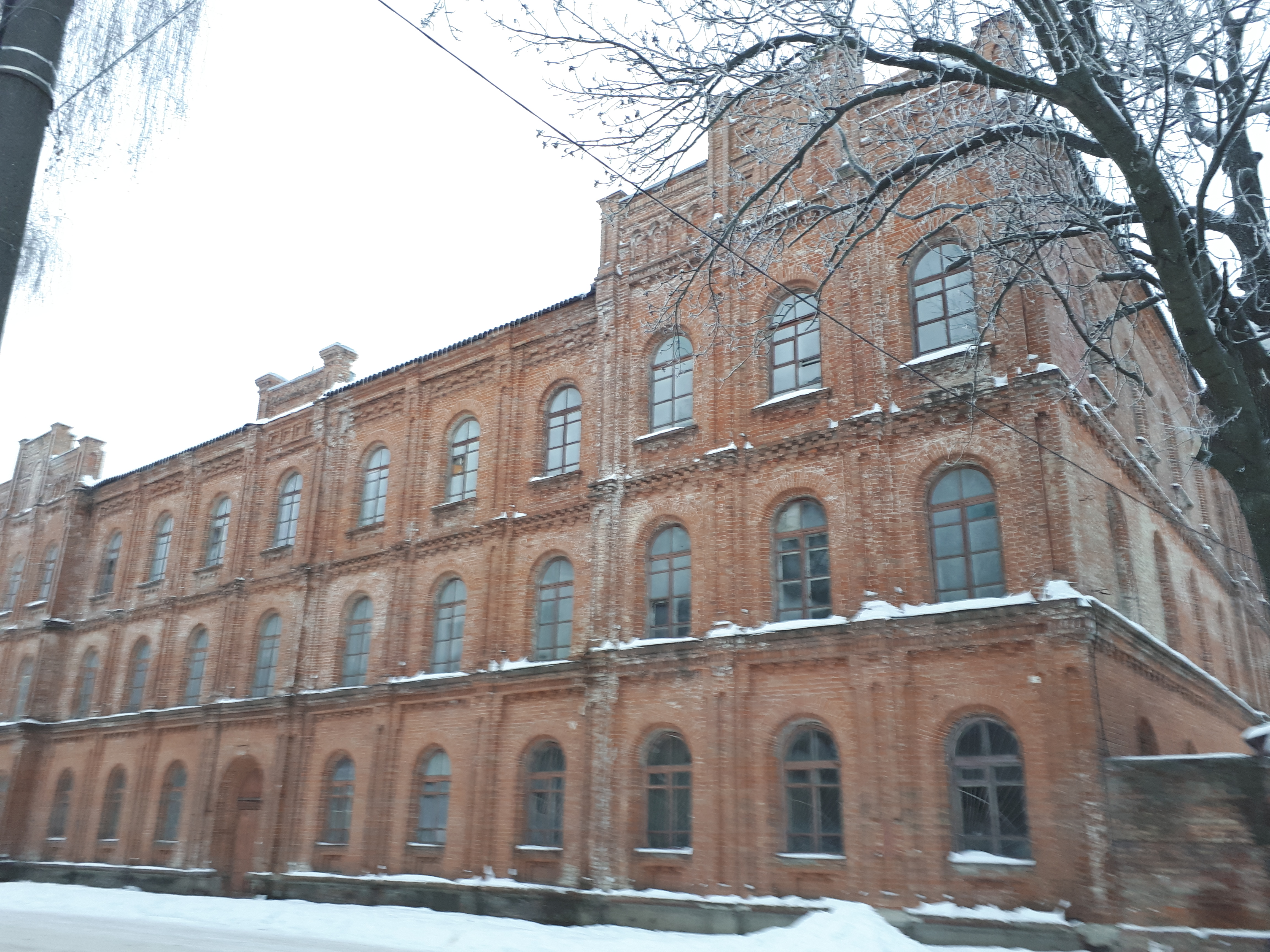 Триповерхова будівля сфотографована в січні 2008 року для "Вікімарафону 2018"